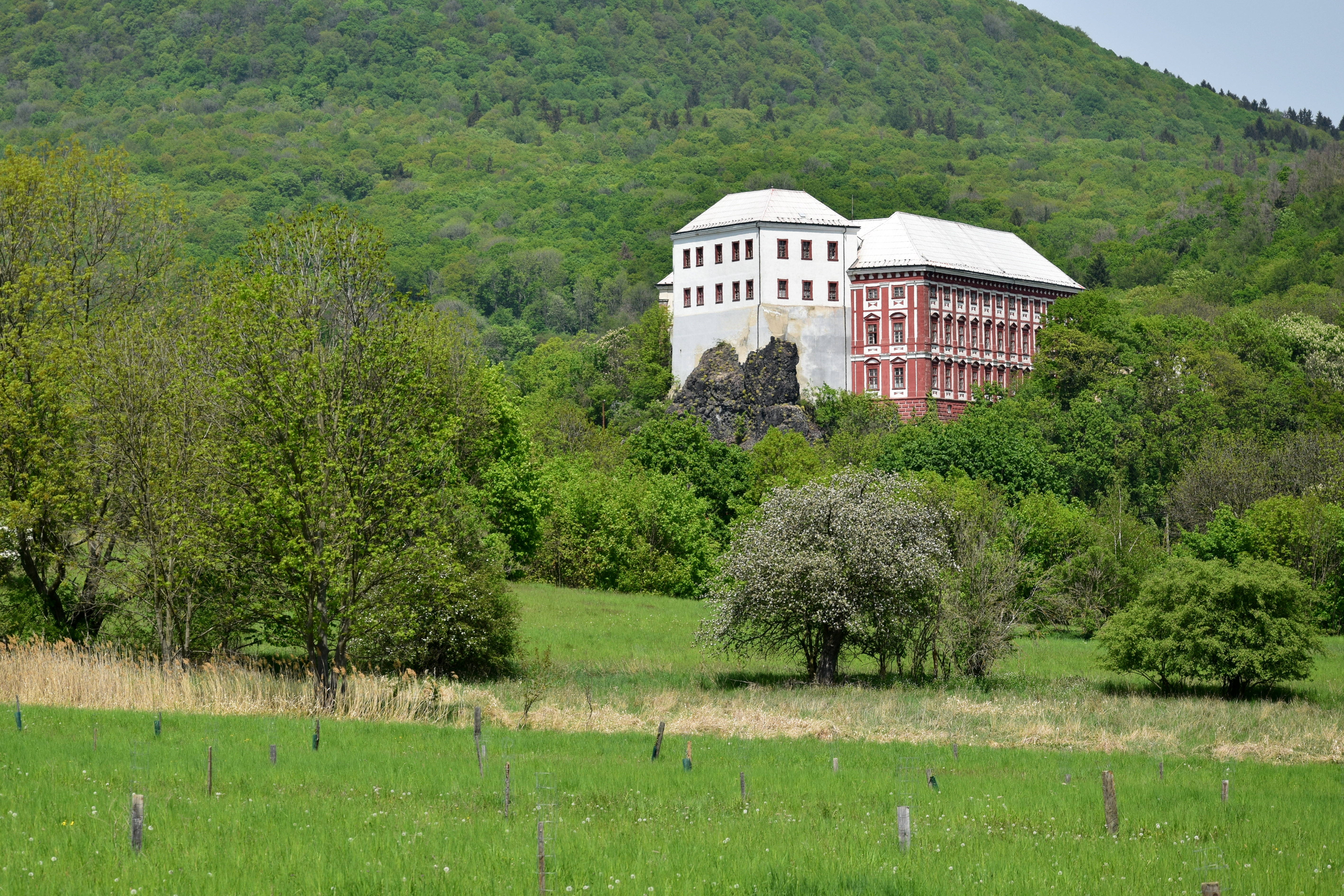 Milešov – celkový pohled z jihu